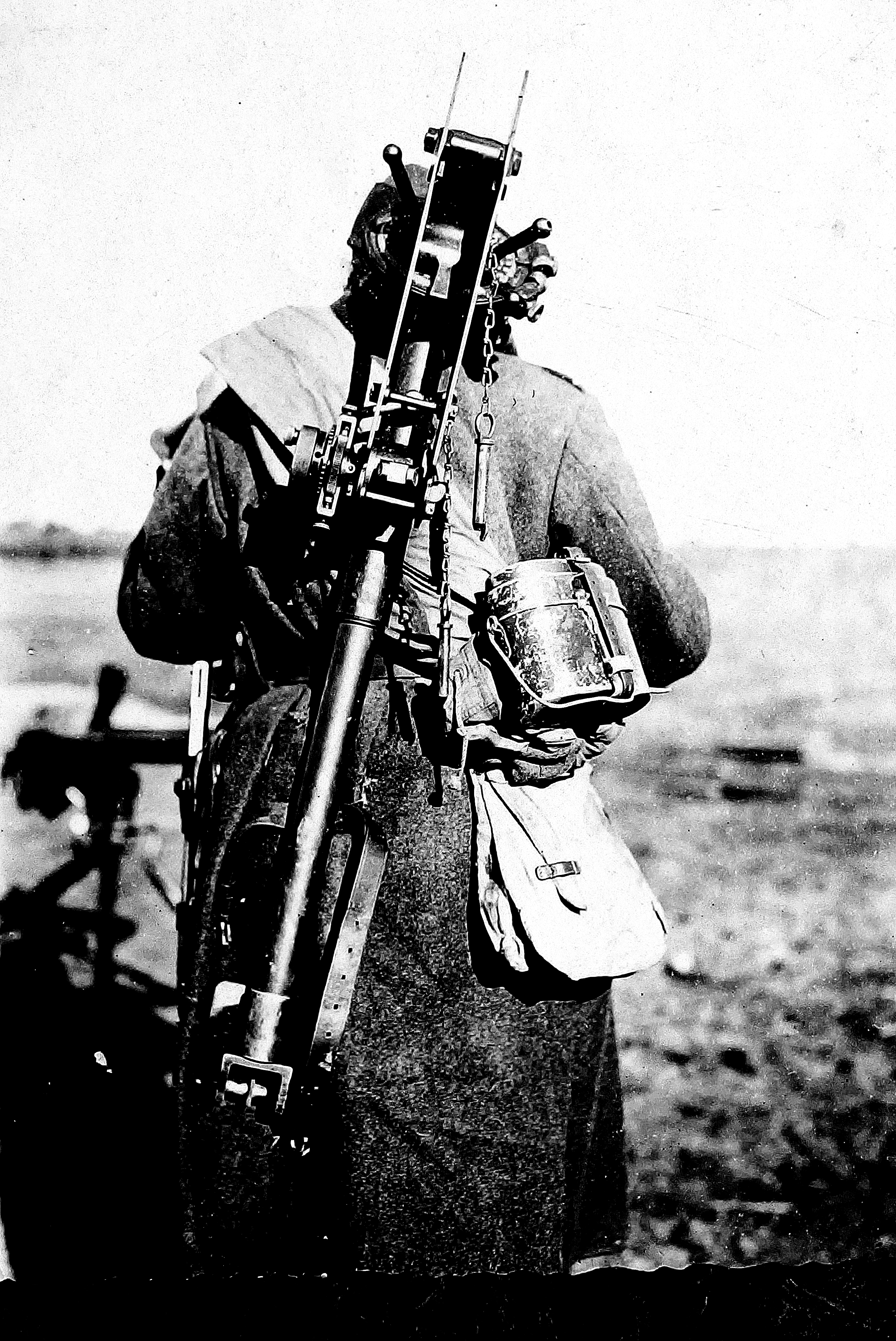 Grodno